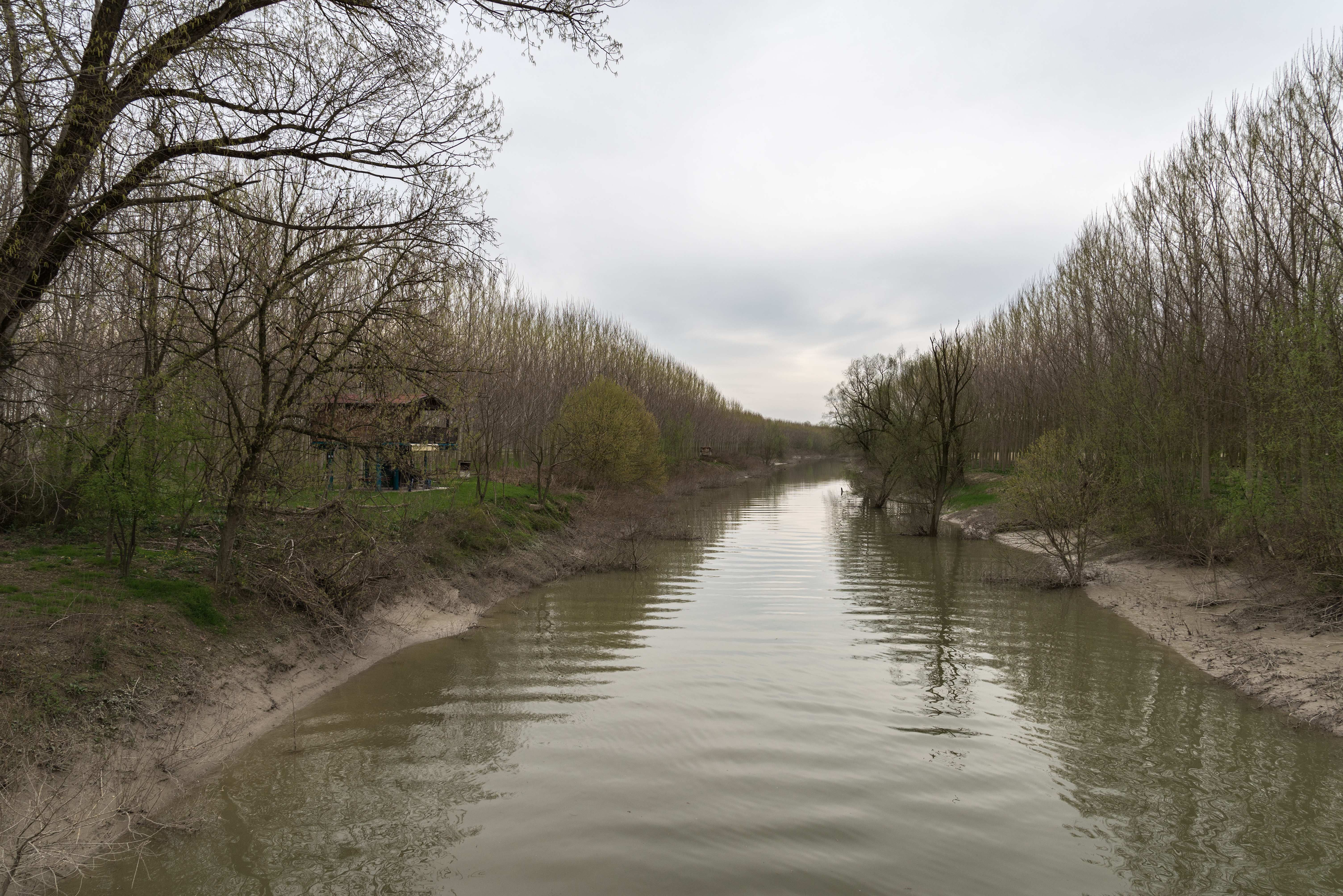 Torrente Crostolo - Guastalla, Reggio Emilia, Italia